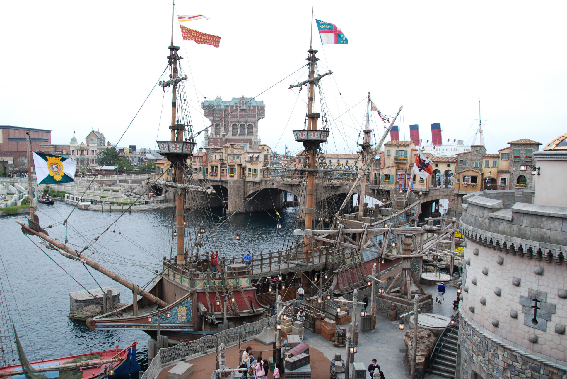 Maihama, Urayasu, Chiba Prefecture 279-0031, Japan